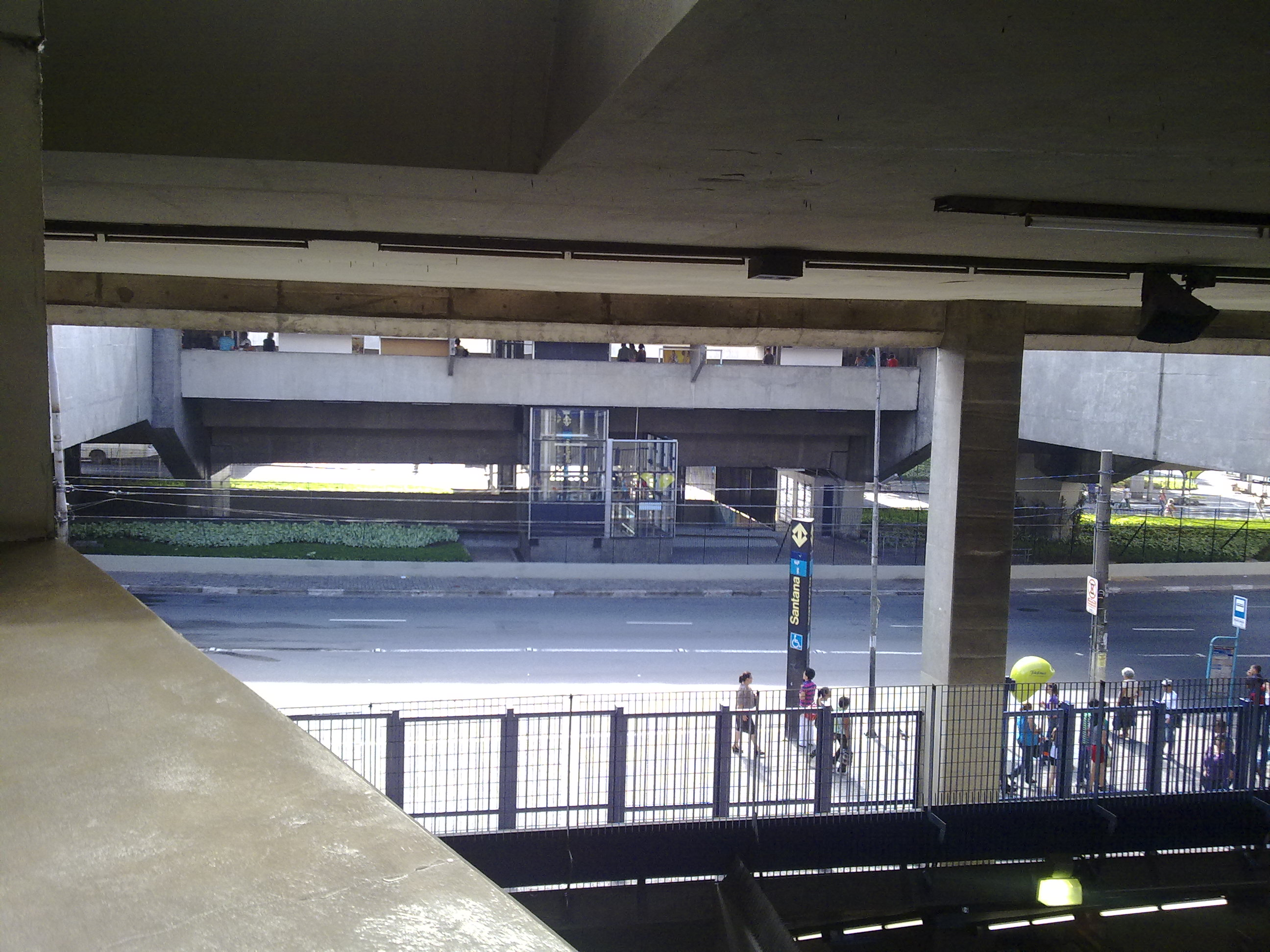 Fot da estação Santana do Metrô DE são Paulo